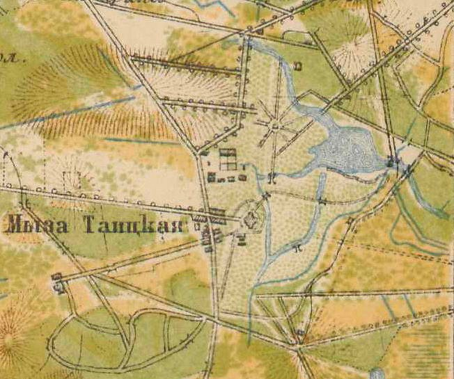 Мыза Таицкая на карте 1885 года.